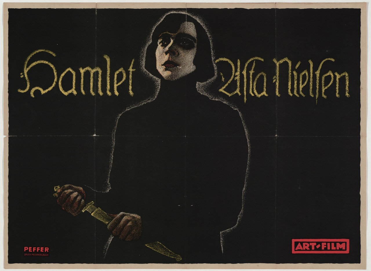 Die Besitzerin, das Museum of Modern Art (MoMA) datiert dieses von dem Künstler Franz Peffer entworfene und von der Verlagsdruckerei Meissner & Buch in Leipzig vervielfältigte Kinoplakat auf das Jahr 1920. Es zeigt die dänische Schauspielerin Asta Nielsen in dem von ihr 1921 produzierten Stummfilm Hamlet. Das Plakat trägt unten rechts den Zudruck in rot von einem der Filmproduzenten, der Art-Film GmbH mit Sitz in Berlin ...